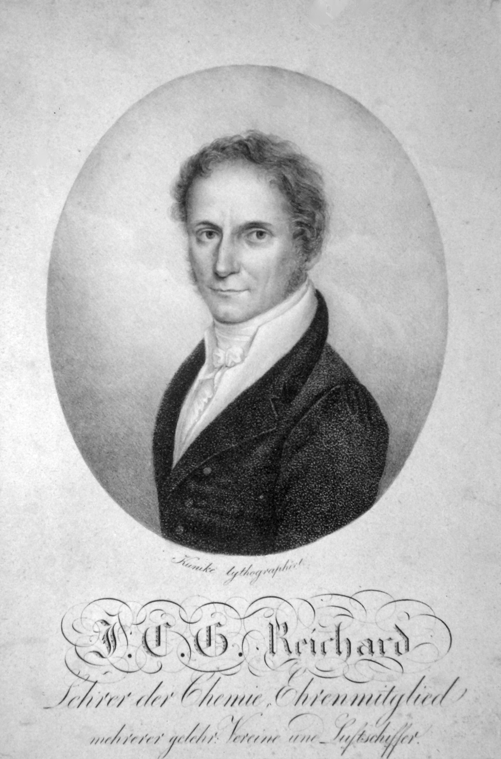 Gottfried Reichard (1786-1844), Chemiker, Luftschiffer. Lithographie von Adolph Friedrich Kunike, um 1820